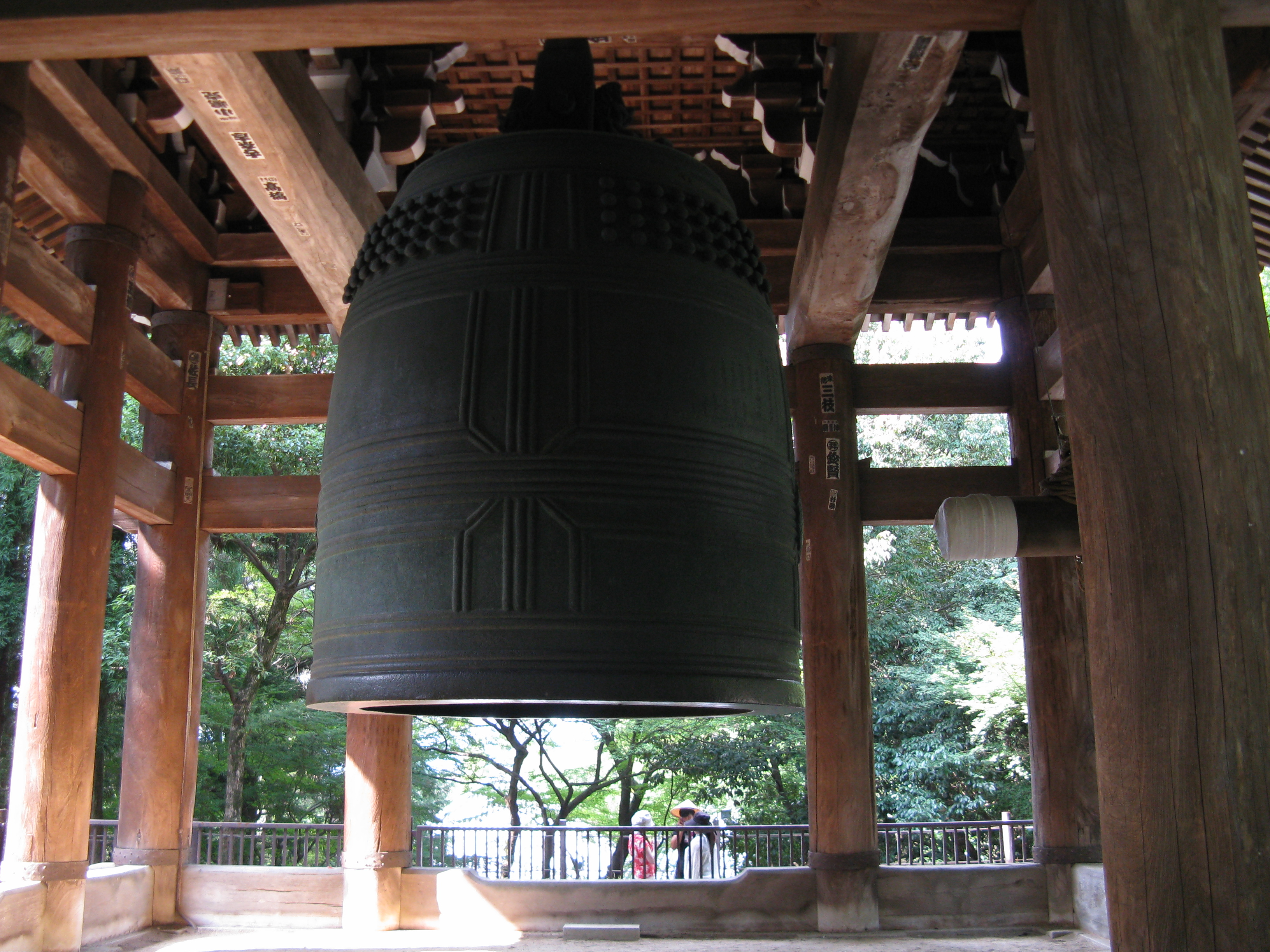 知恩院 大鐘楼